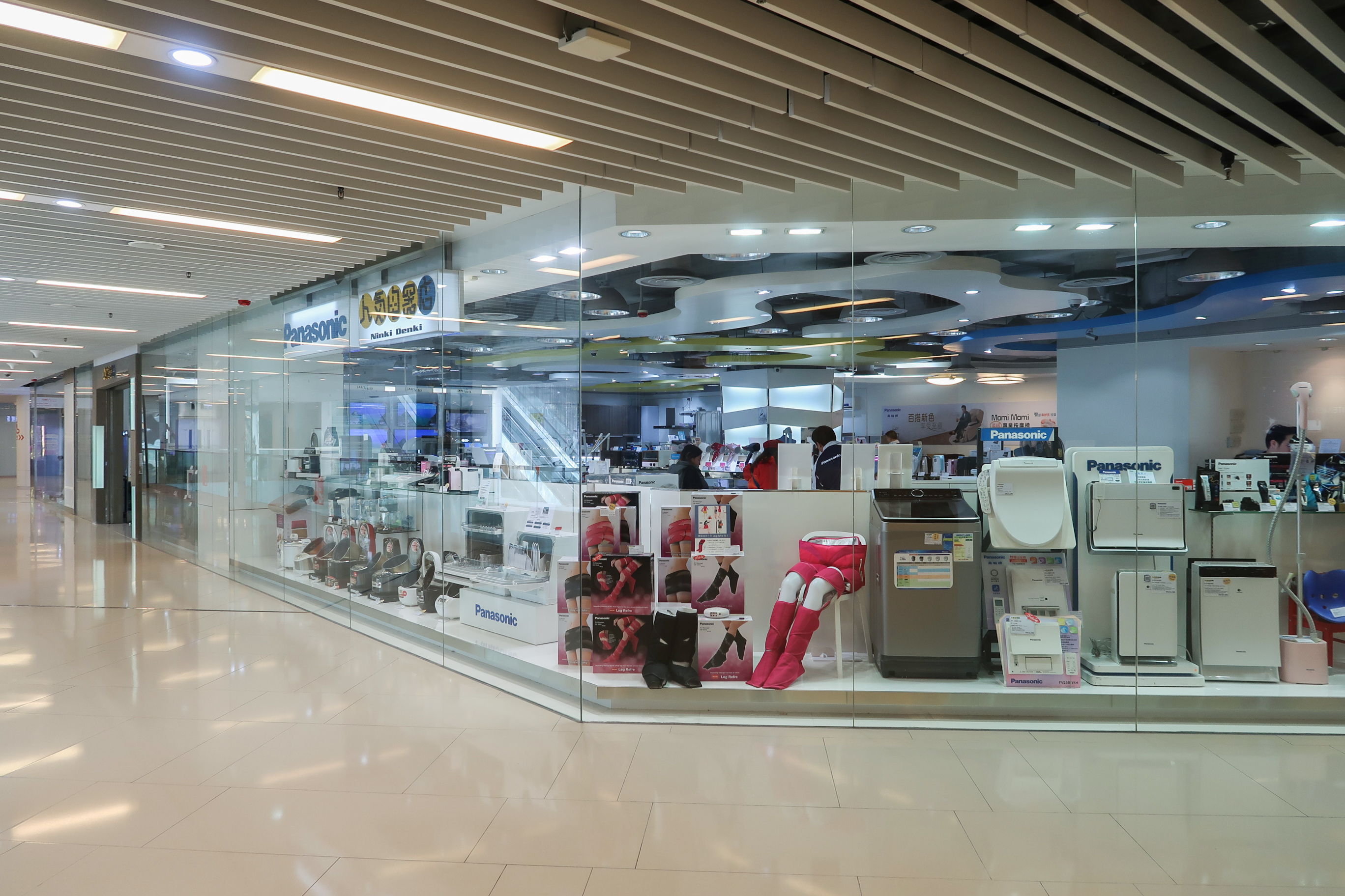 Panasonic Ninki Denki in iSQUARE